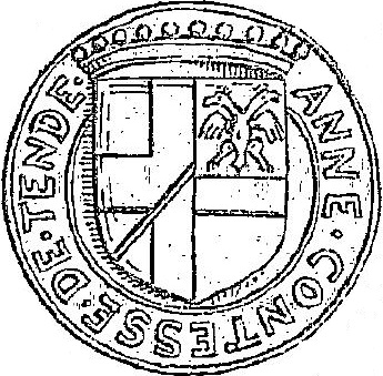 Sigillo di Anna Lascaris contessa di Ventimiglia e Tenda, marchesa di Villars, 1534.